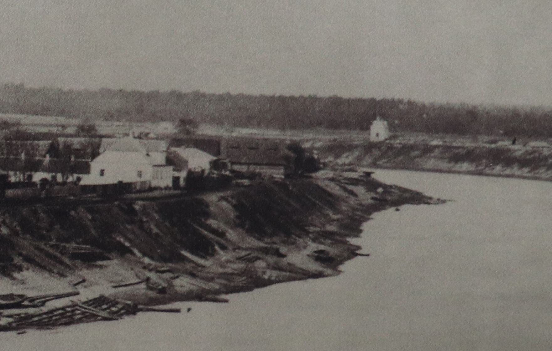 Беларуская (тарашкевіца): Віцебск (Viciebsk), Пескавацік (Pieskavacik). Царква Сьвятых Барыса і Глеба